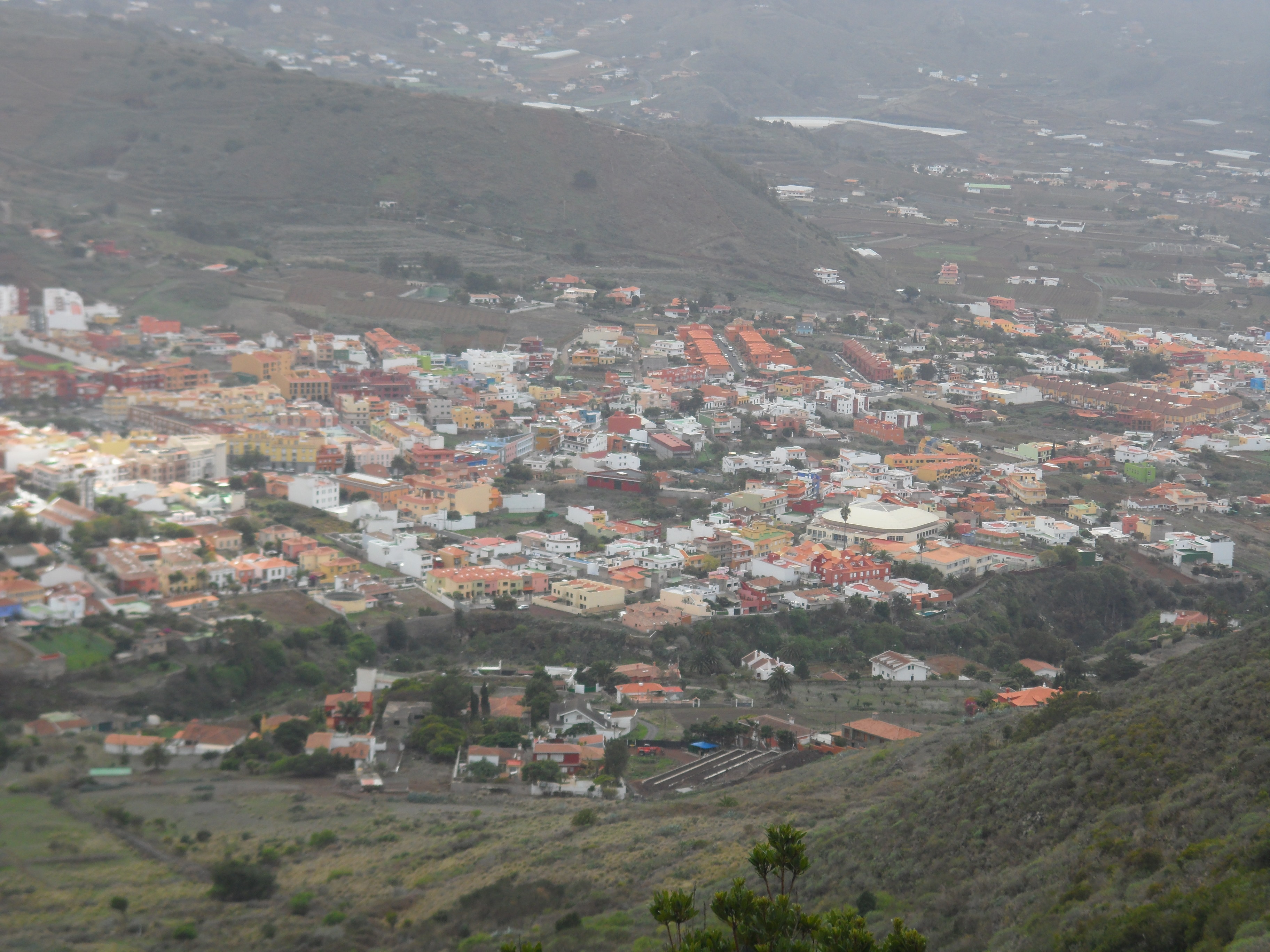 Panorámica del Valle de Tegueste, desde lo alto del Camino de la Orilla.